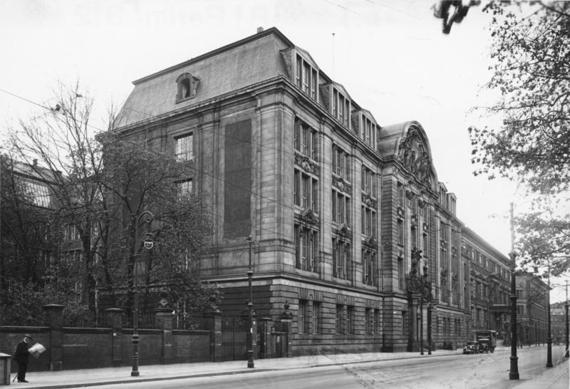 Zentralbild / Berlin 1933 Der preußische Ministerpräsident hat die bisher den Polizeipräsidenten unterstehende politische Polizei zu einer selbständigen Behörde gemacht, und sie als Geheime Staatspolizei dem Reichssicherheitshauptamt unterstellt. UBz: den Sitz des Geheimen Staatspolizeihauptamtes in Berlin SW 11, Prinz-Albrecht-Straße 8.